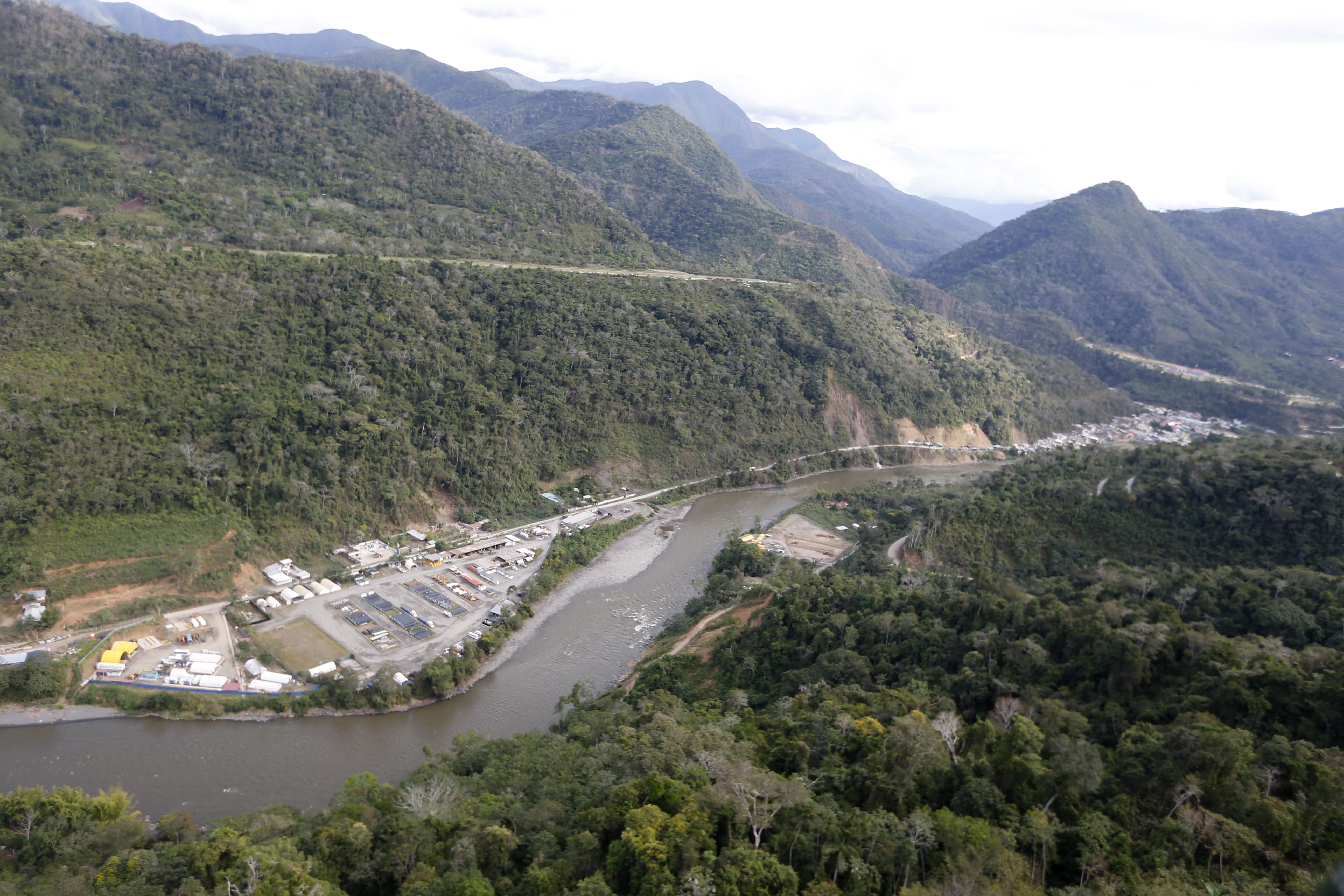 El Ministro de Defensa, Jakke Valakivi, acompañado por el Jefe del Comando Conjunto de las Fuerzas Armadas, Almirante Jorge Moscoso, visitó el eje energético de La Convención en Cusco. En su recorrido supervisó el buen funcionamiento de la planta Malvinas del Consorcio Camisea, la Base Logística Ticumpinia del Gasoducto Sur Peruano S.A. y la Base Transportadora Gas Perú (TGP) en Kiteni, donde las Fuerzas Armadas guardan celosamente la seguridad del desarrollo energético de la Nación.